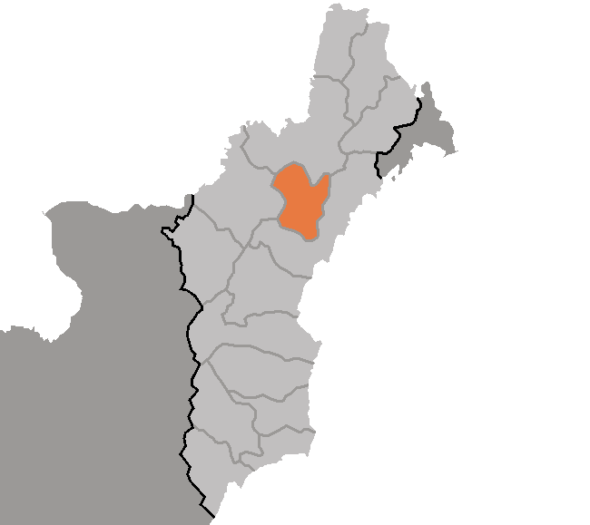 Map of Puryong, Hamgyong-pukto, DPRK, 2006